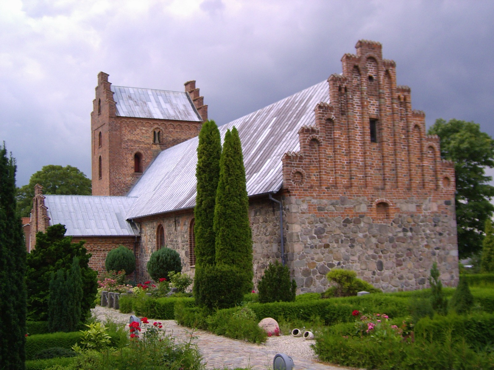 Nørre Herlev Kirke, syd- og østside. Hillerød Kommune, Hillerød provsti, Helsingør stift